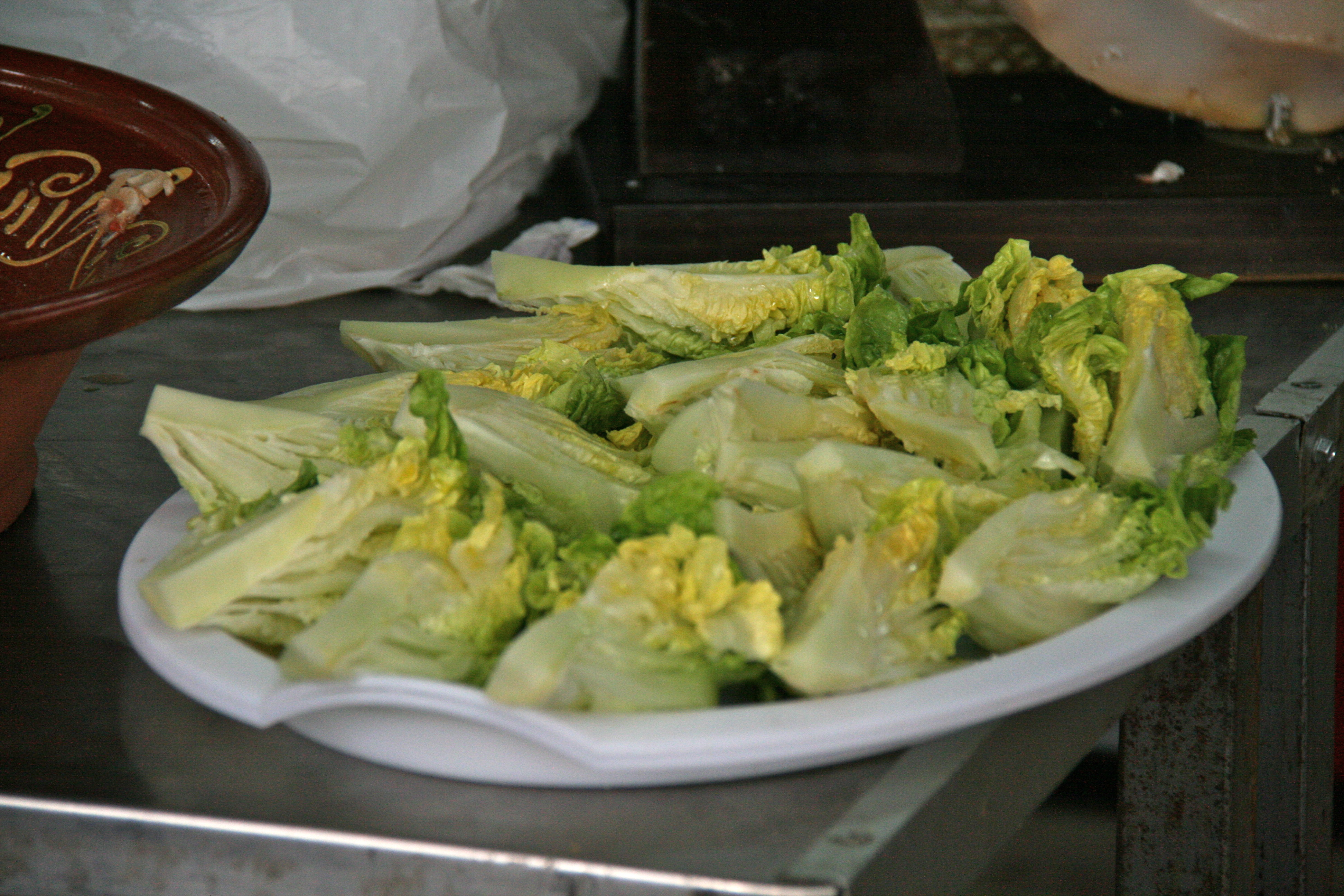 Gartensalatherzen